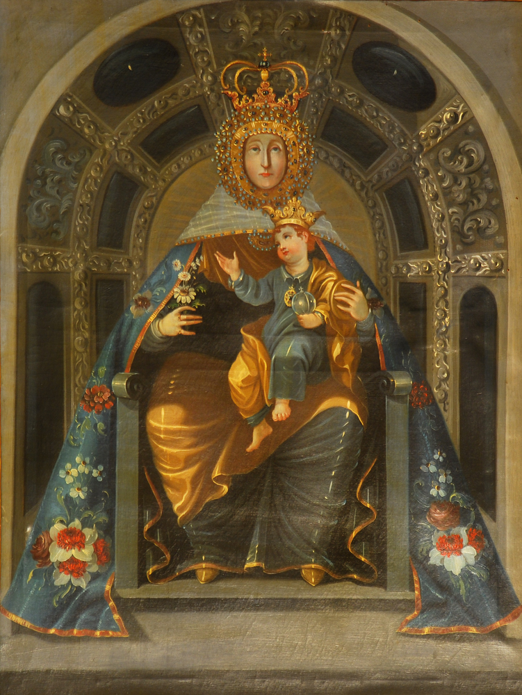 Cuadro barroco de la Virgen de la catedral de Pamplona